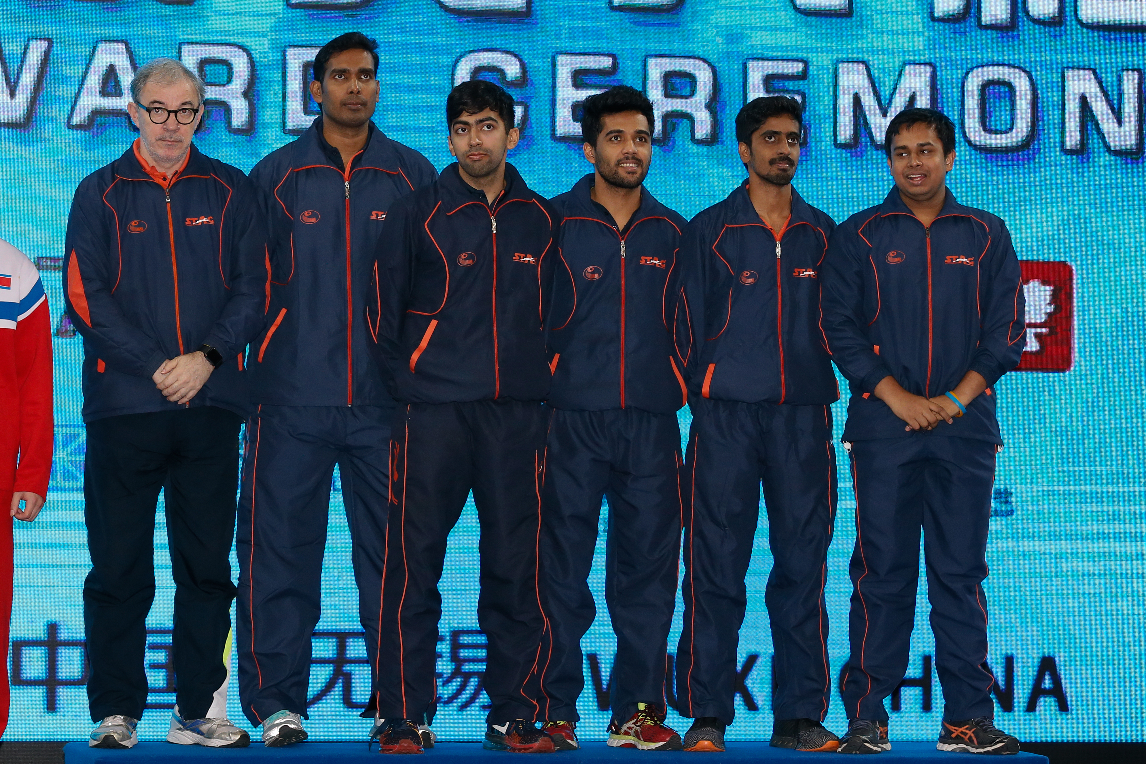 _K0K6280